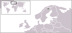 LocationKiruna